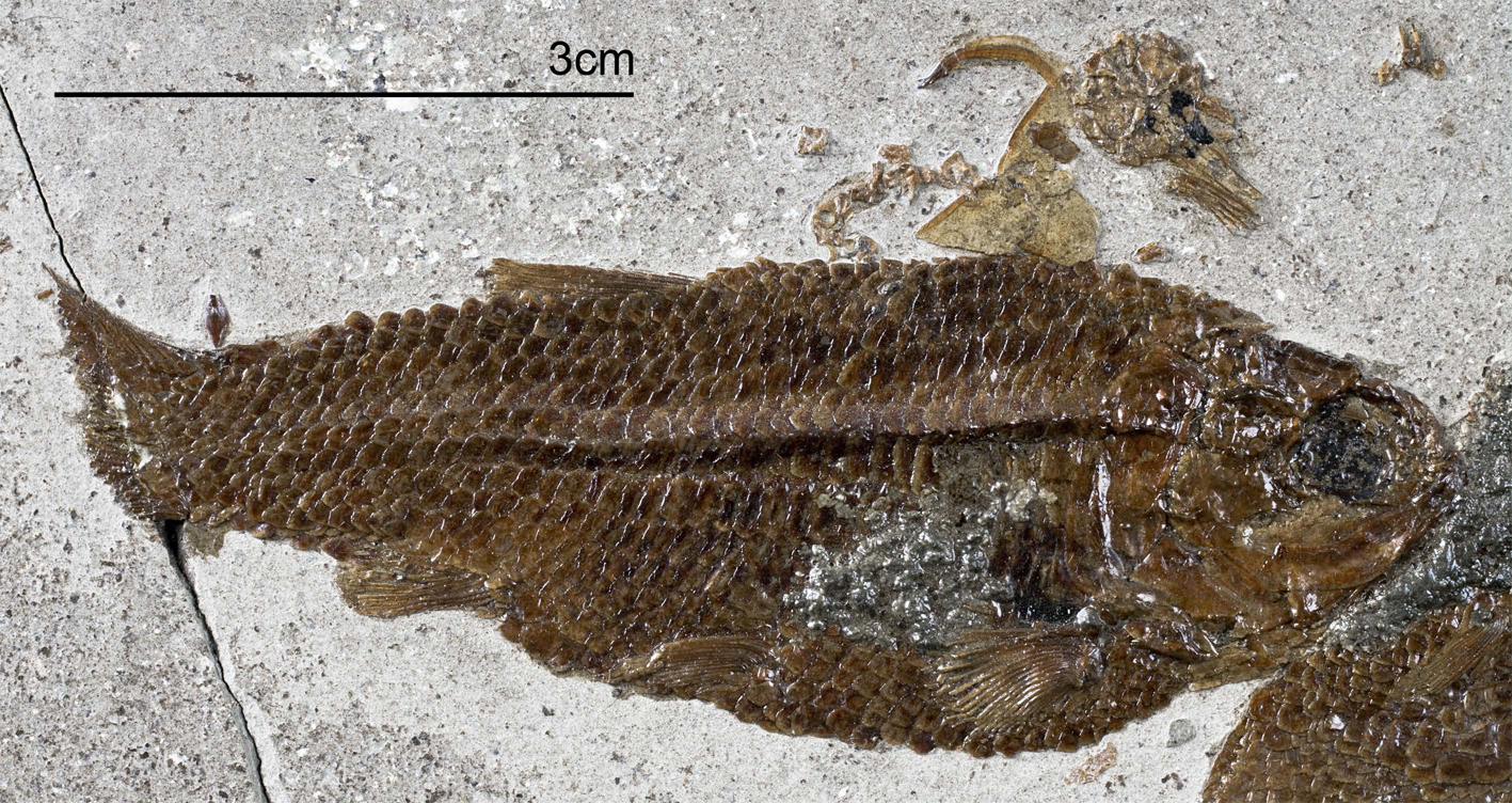 Fossil of Luxembourgichthys friedeni